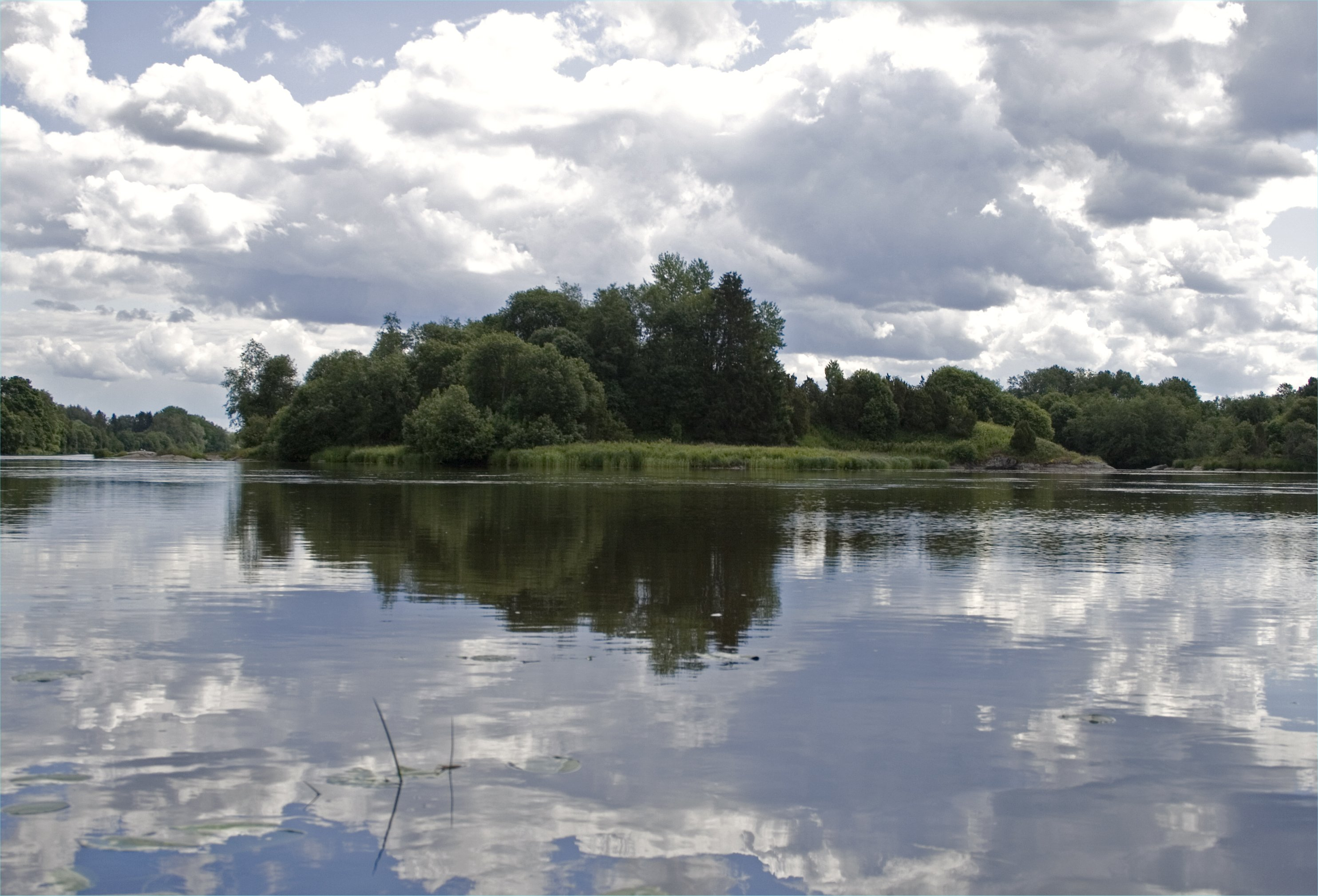 Kokemäen linnaluodossa on ilmeisesti sijainnut muinainen linna. Kummallakin puolella vesi virtasi aikoinaan koskena.